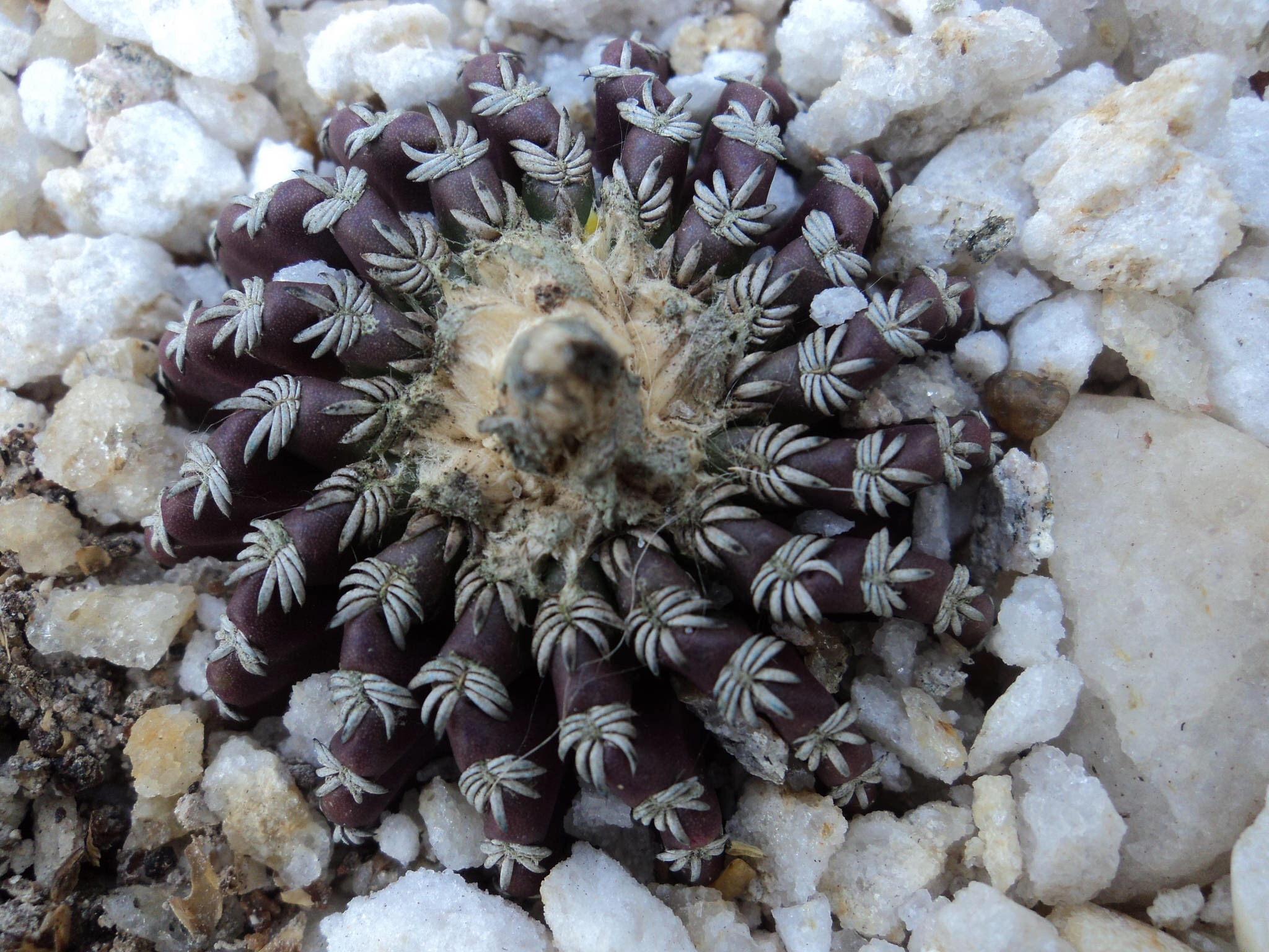 Grao Mogol, MG, Brasil